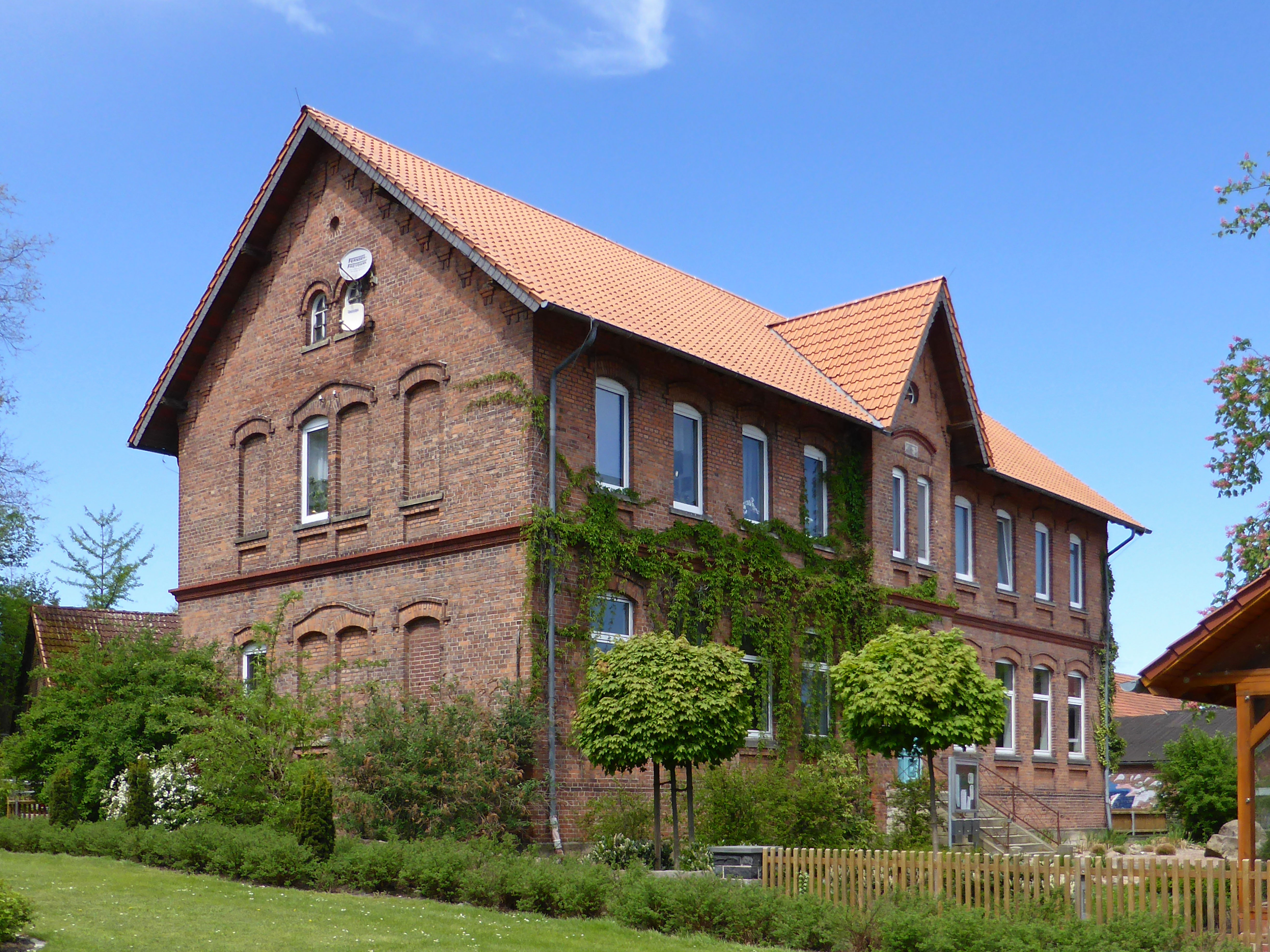 Ehemalige Schule, heute Gemeindeverwaltung, in Parsau.